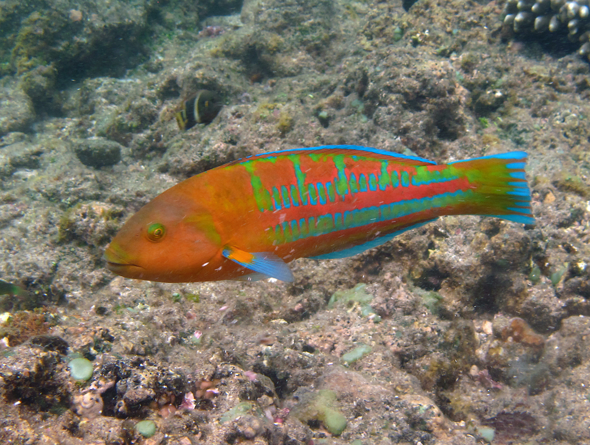 Une girelle de Noël (Thalassoma trilobatum) à la Réunion.